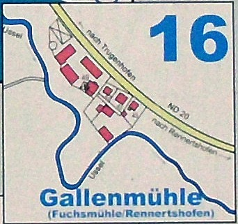 Ortsplan der Gallenmühle/Fuchsmühle, einem Ortsteil von Rennertshofen im bayerischen Landkreis Neuburg-Schrobenhausen